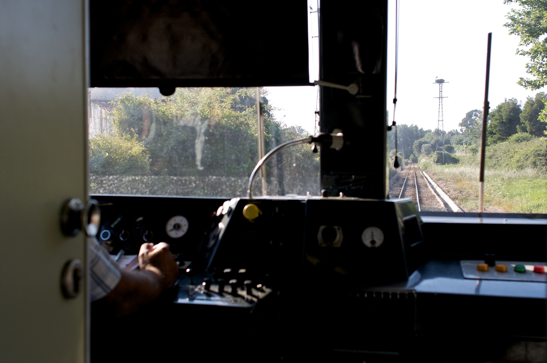 a fazer o Comboio Regional 5120 [Águeda - Aveiro]. Local: Travassô [Linha do Vouga, PK 21] Data e hora: 6 de Julho de 2010 [18h45] Material: Automotora 9635 [Unidade Dupla Diesel - Via Estreita (Sorefame • CAF)]